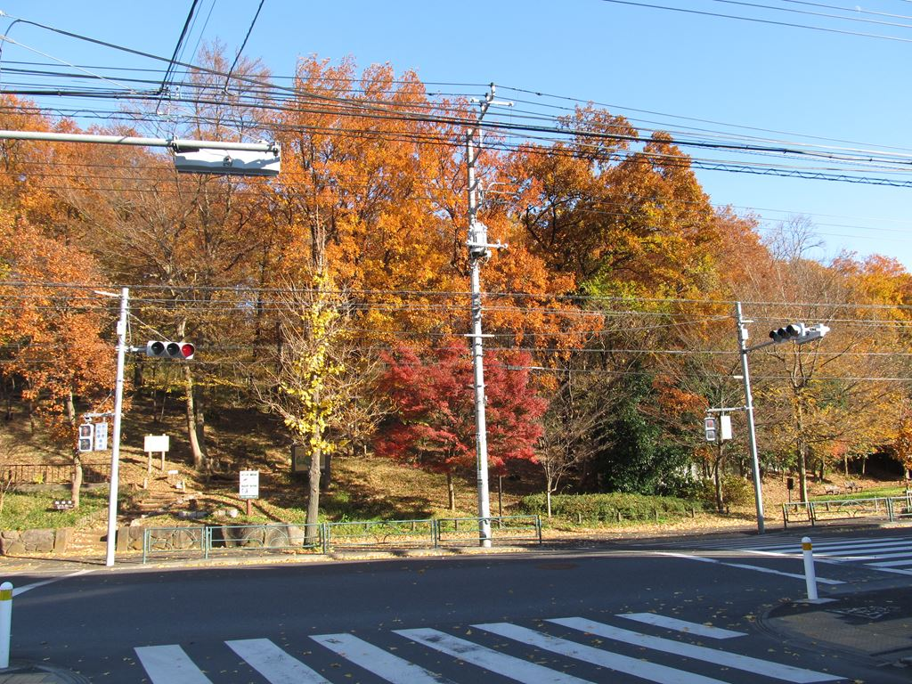 浅間山、西方より。東京都府中市。Fuchu-city, Tokyo